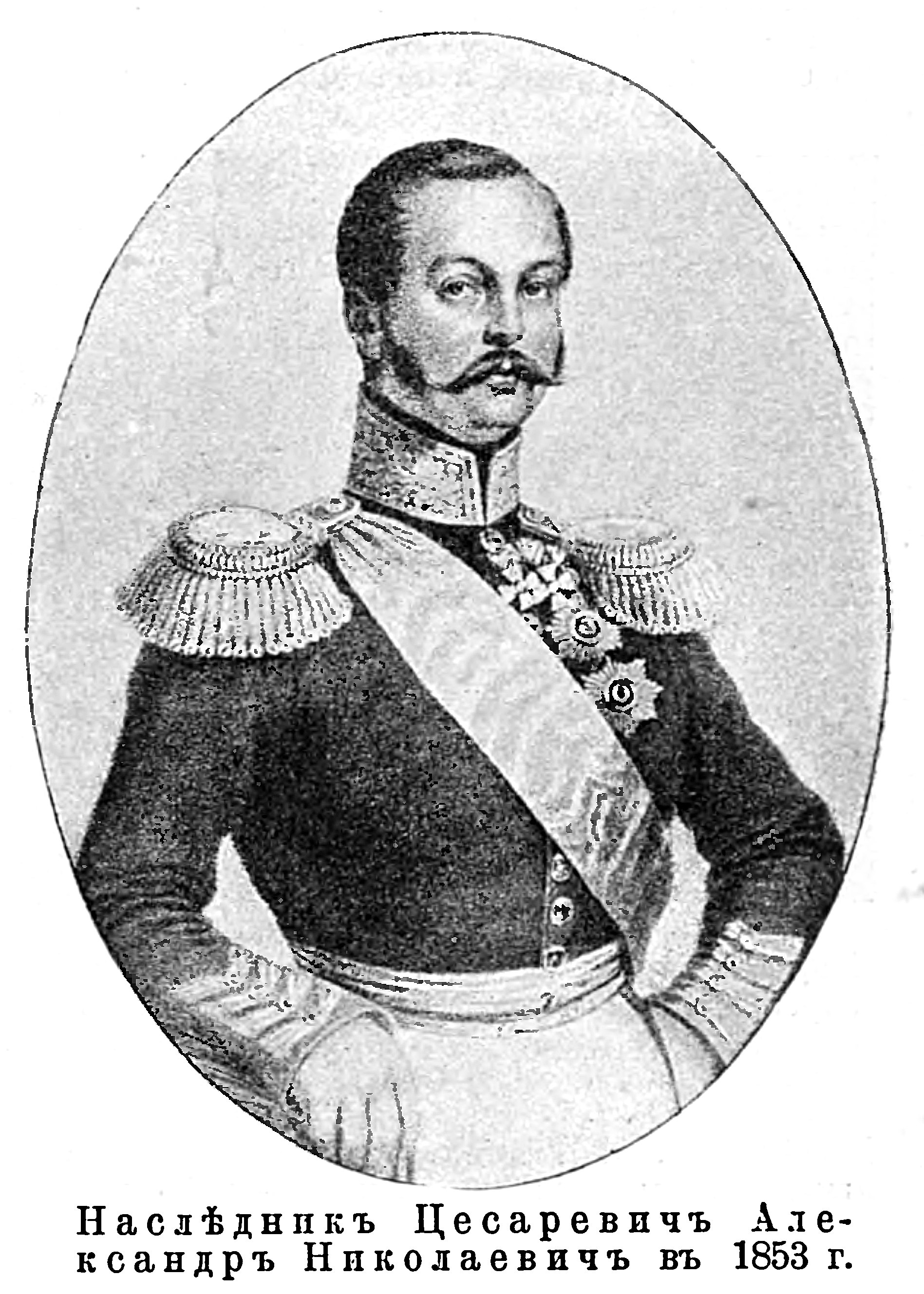 Данное изображение было использовано в «Военной энциклопедии» изданной книгоиздательским товариществом Ивана Дмитриевича Сытина в городе Санкт-Петербурге в 1911—1915 гг. в статье «Александр II Николаевич».